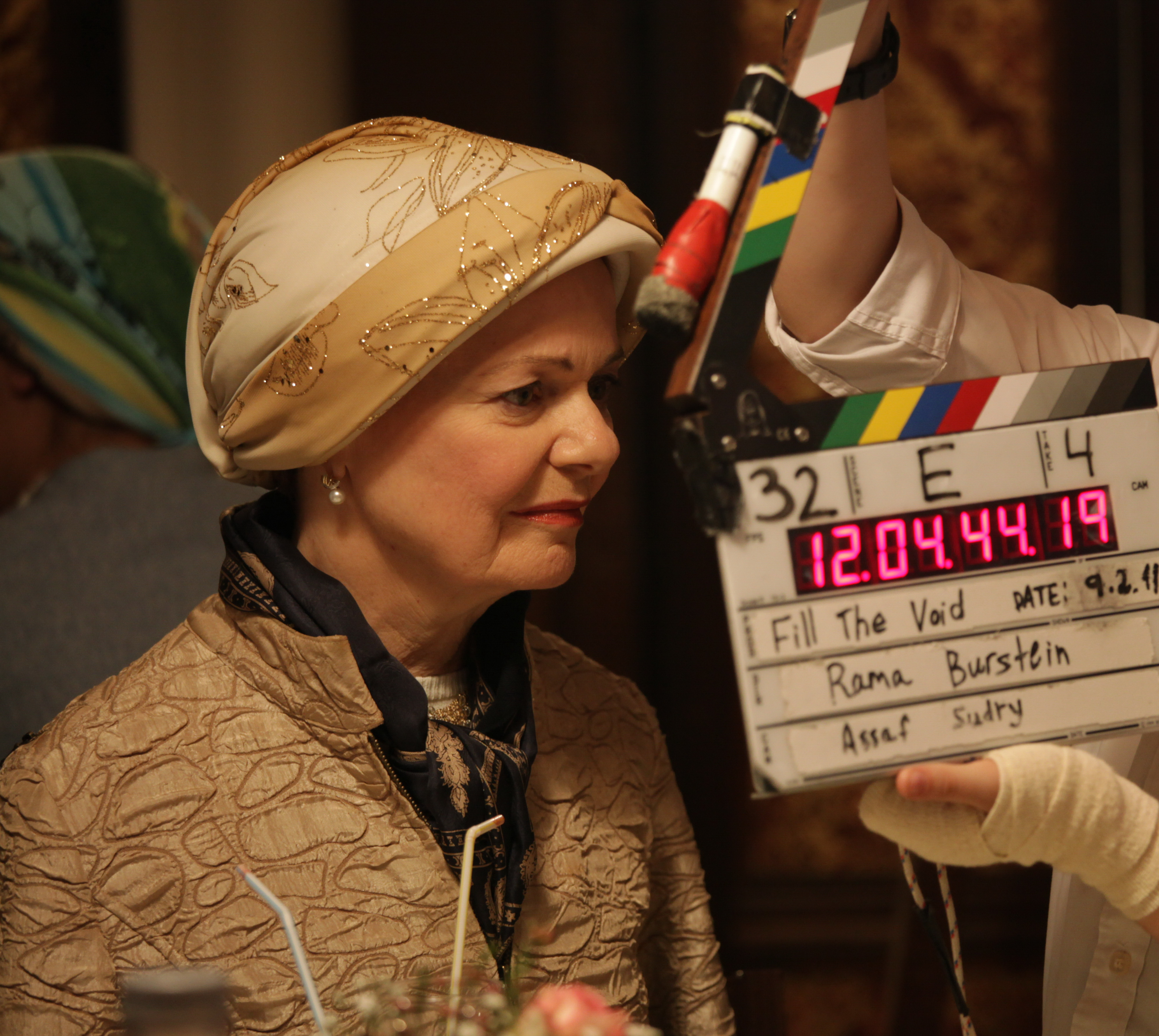 רזיה ישראלי